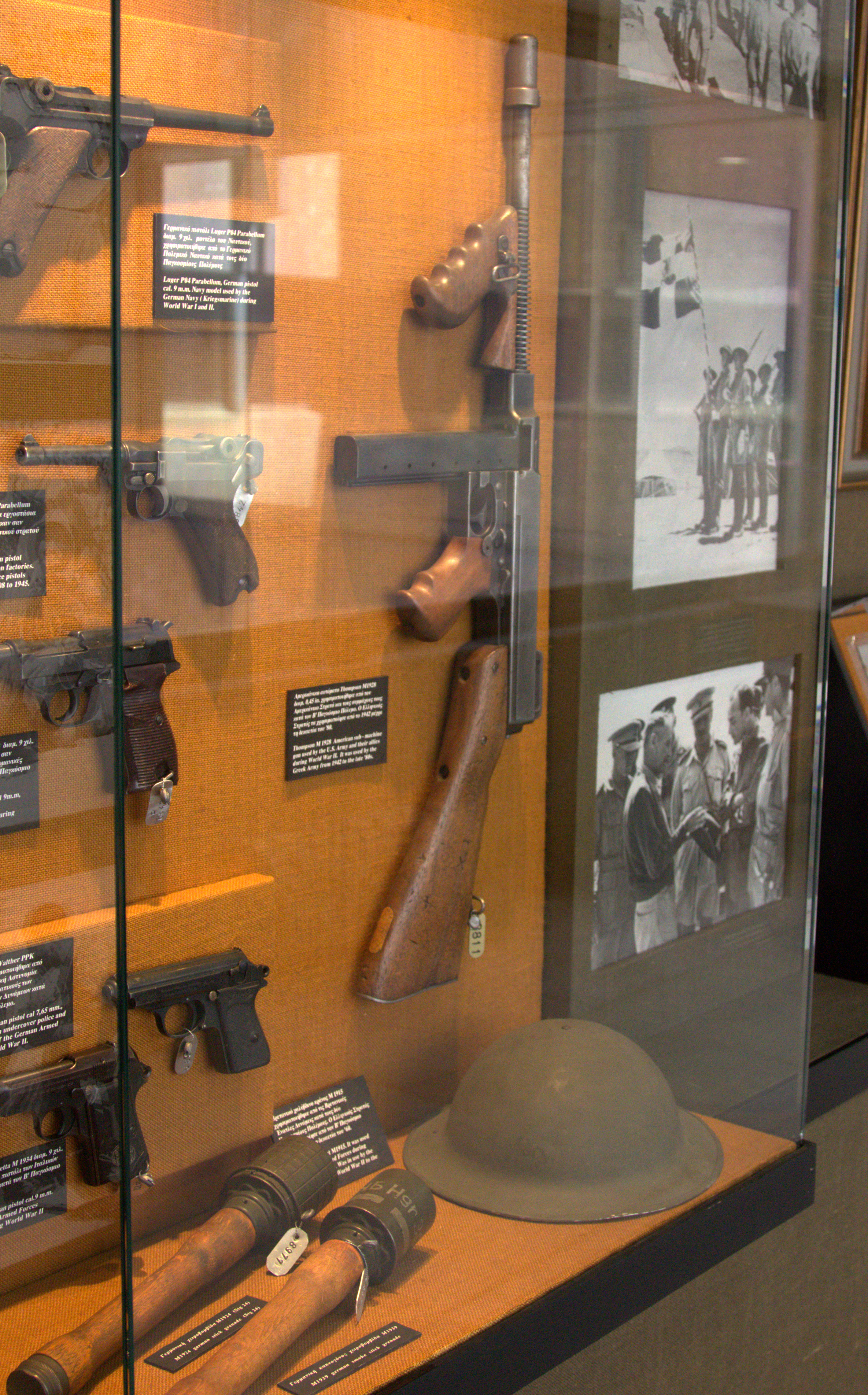 Πολεμικό Μουσείο Ελλάδος. Αθήνα.